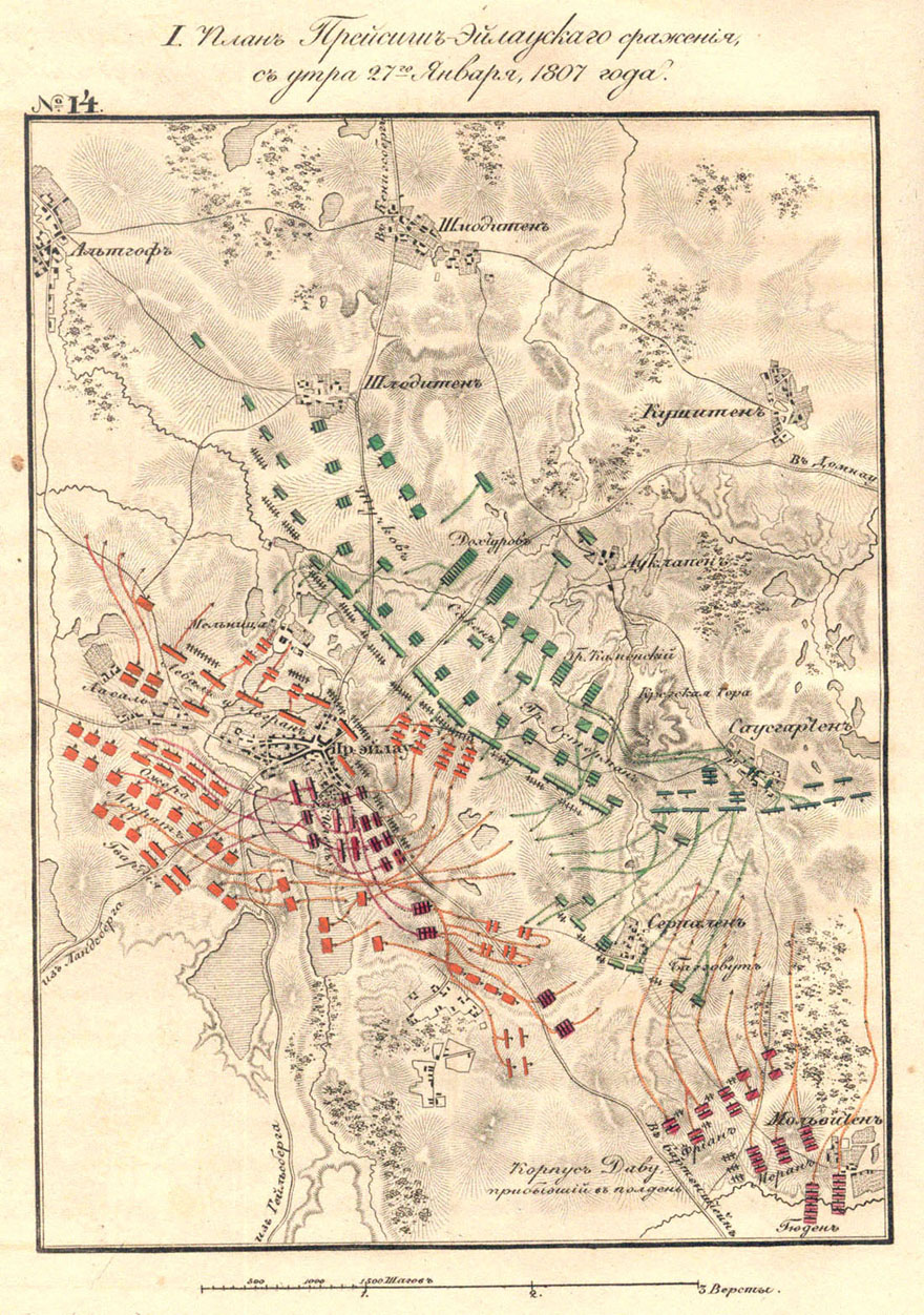 Battle of Preussisch Eylau Map2